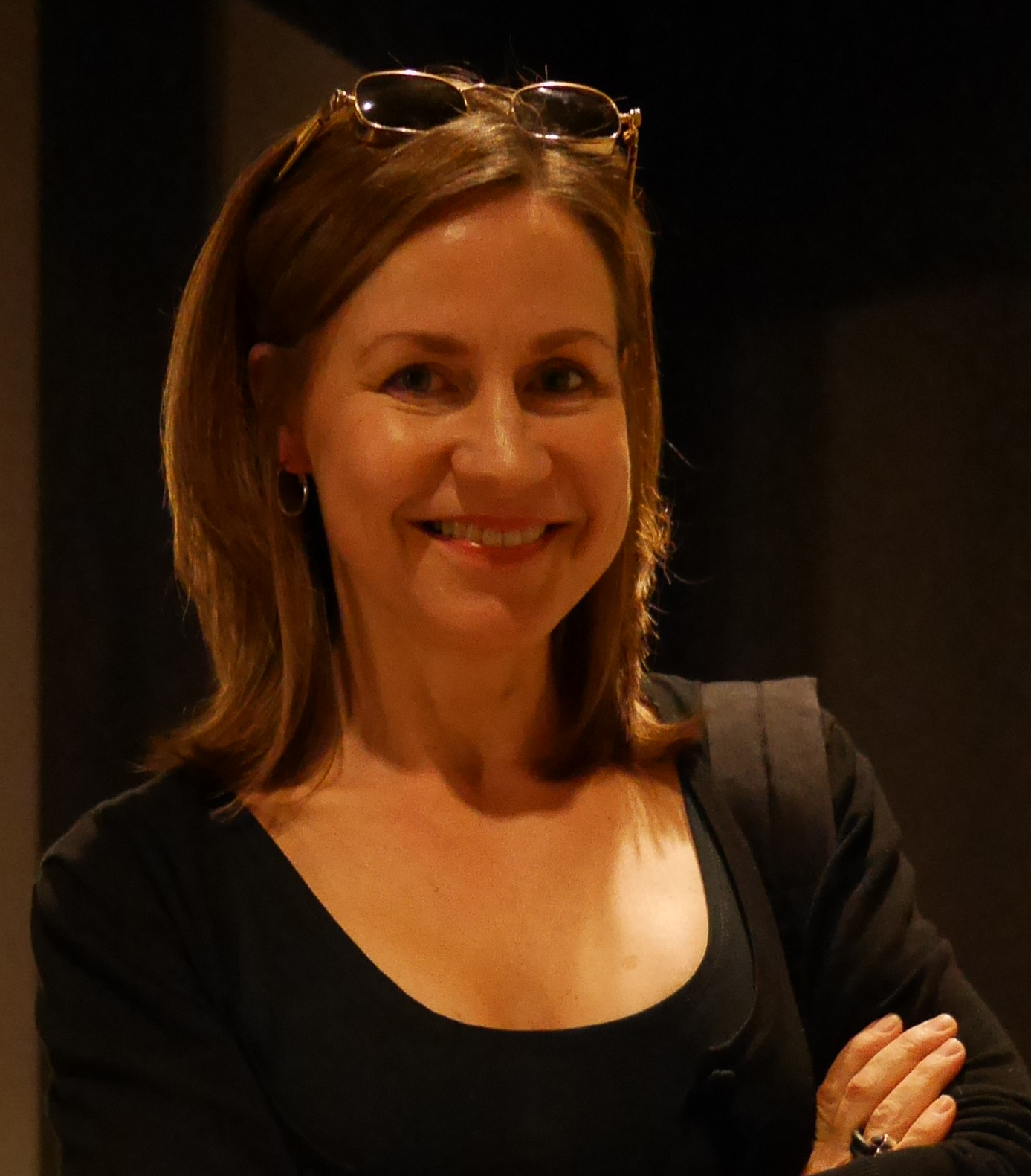 Ann-Charlotte Franzén 2017. Fotograf Peter Einarsson.